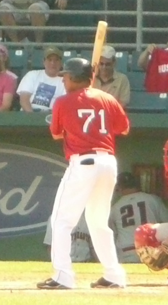 Ángel Chávez